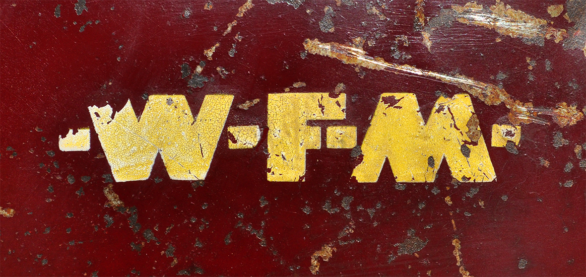 Oryginalne dwukolorowe logo Warszawskiej Fabryki Motocykli umieszczane na zbiorniku paliwa motocykli w 1964 roku.